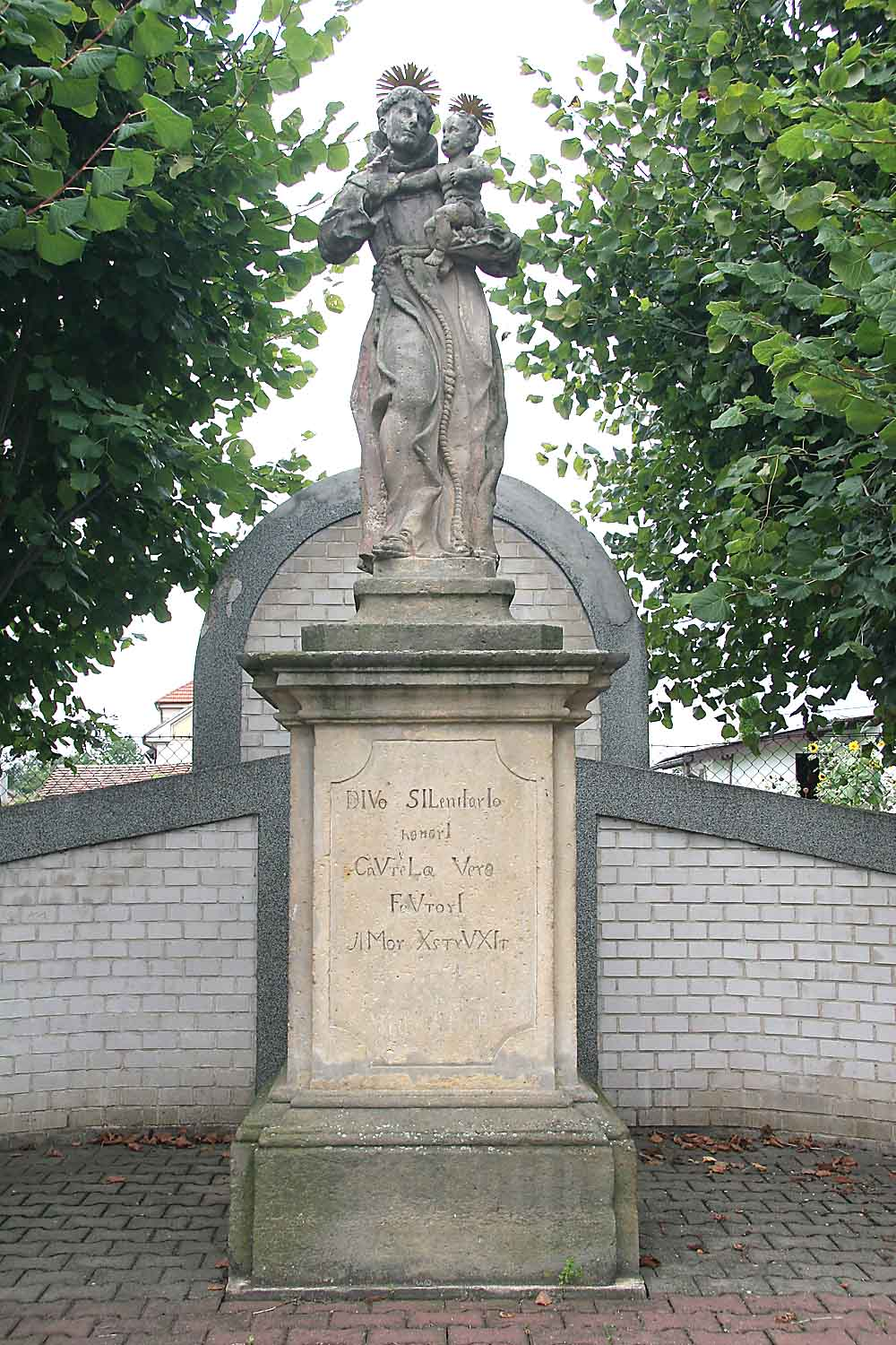 Mokrovousy - Svatý Antonín Paduánský, village in Hradec Králové district, Czech Republic Autor:Prazak Date: 26. 8. 2006